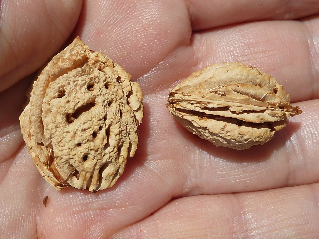 Prunus persica (Nectarina): hueso, vistas lateral y ecuatorial - Comercio, Madrid (España).